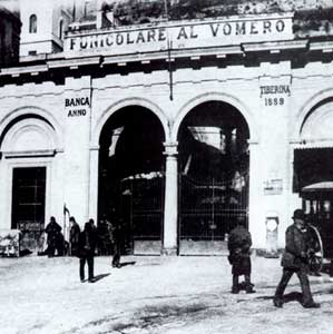 Funicolare al Vomero, Napoli